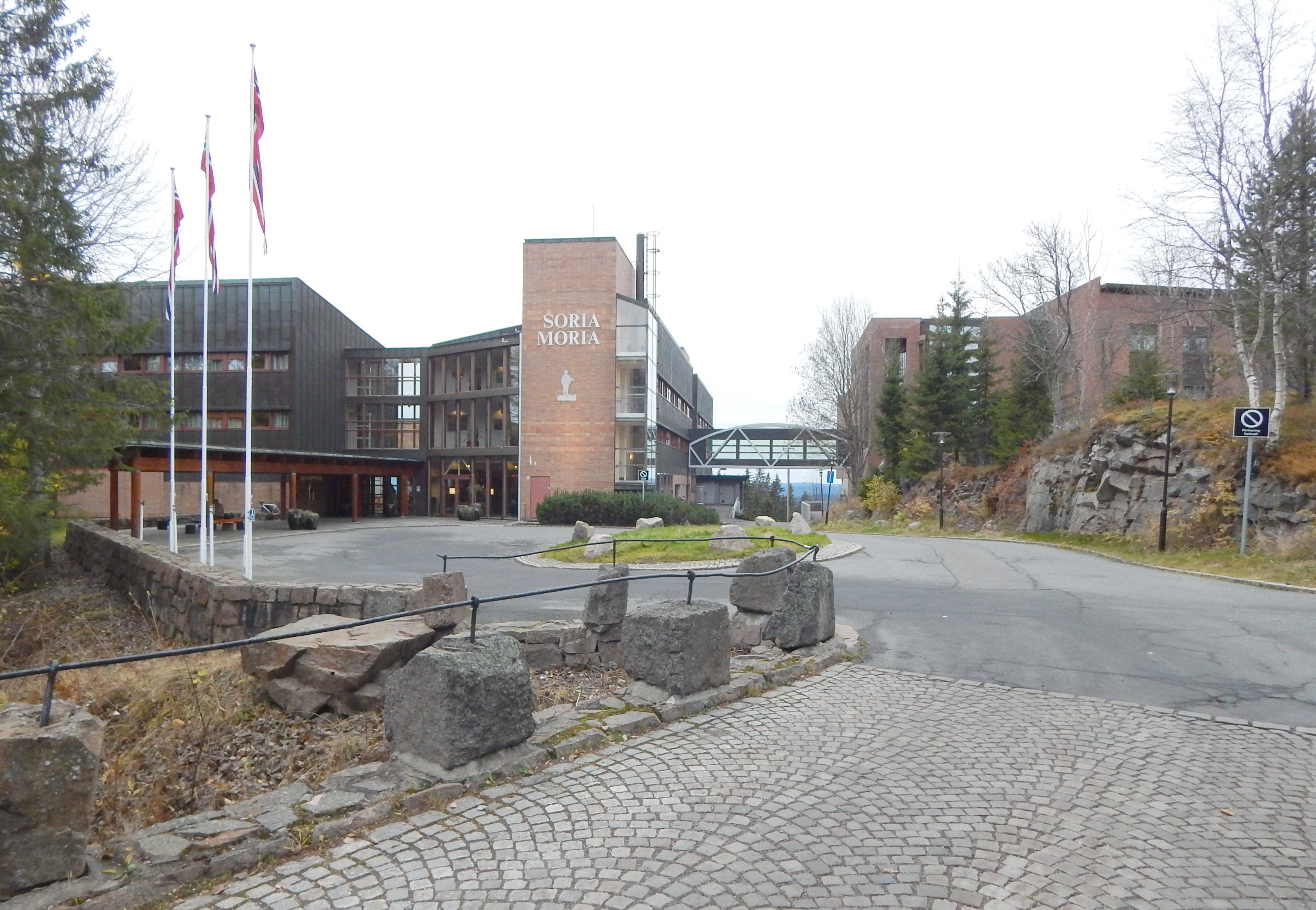 Soria Moria hotell og konferansesenter